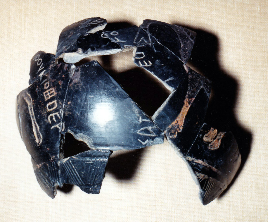 Olla con scrittura sabina, sala 3, primo piano; Museo Archeologico di Magliano Sabina